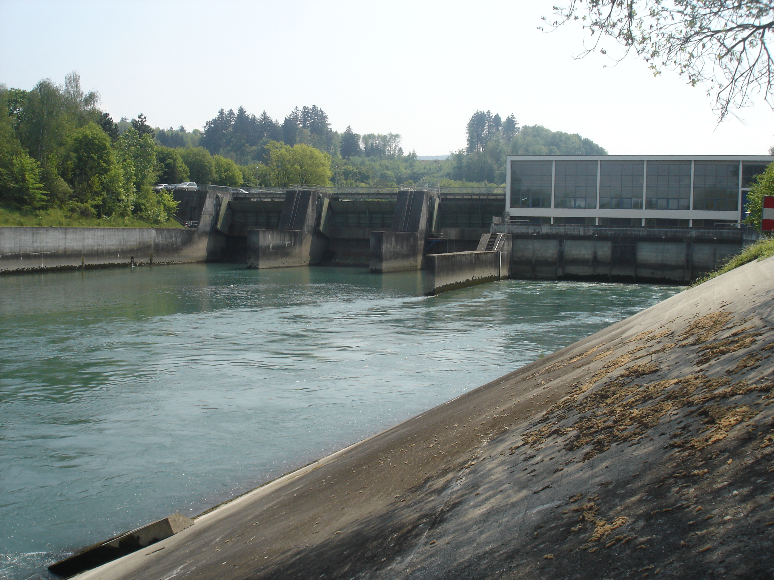 Wasserkraftwerk Aarberg, Schweiz